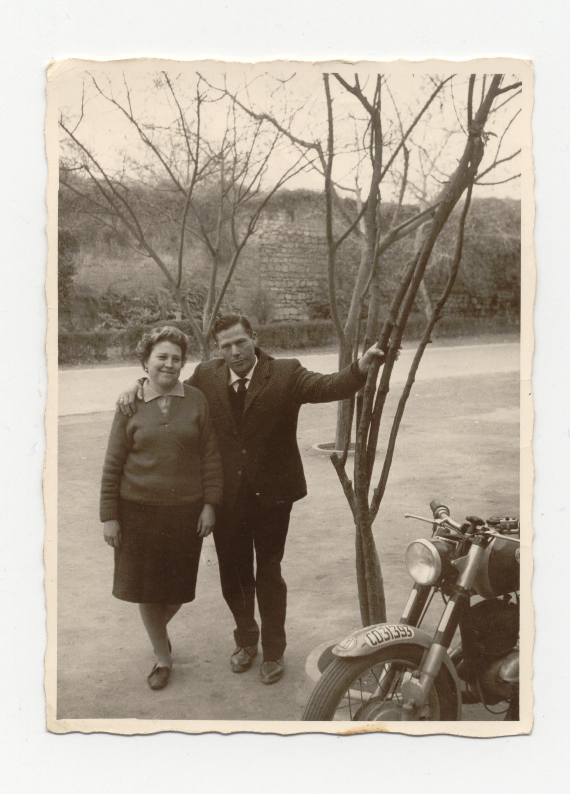 Pepita Patiño y su marido Jaime